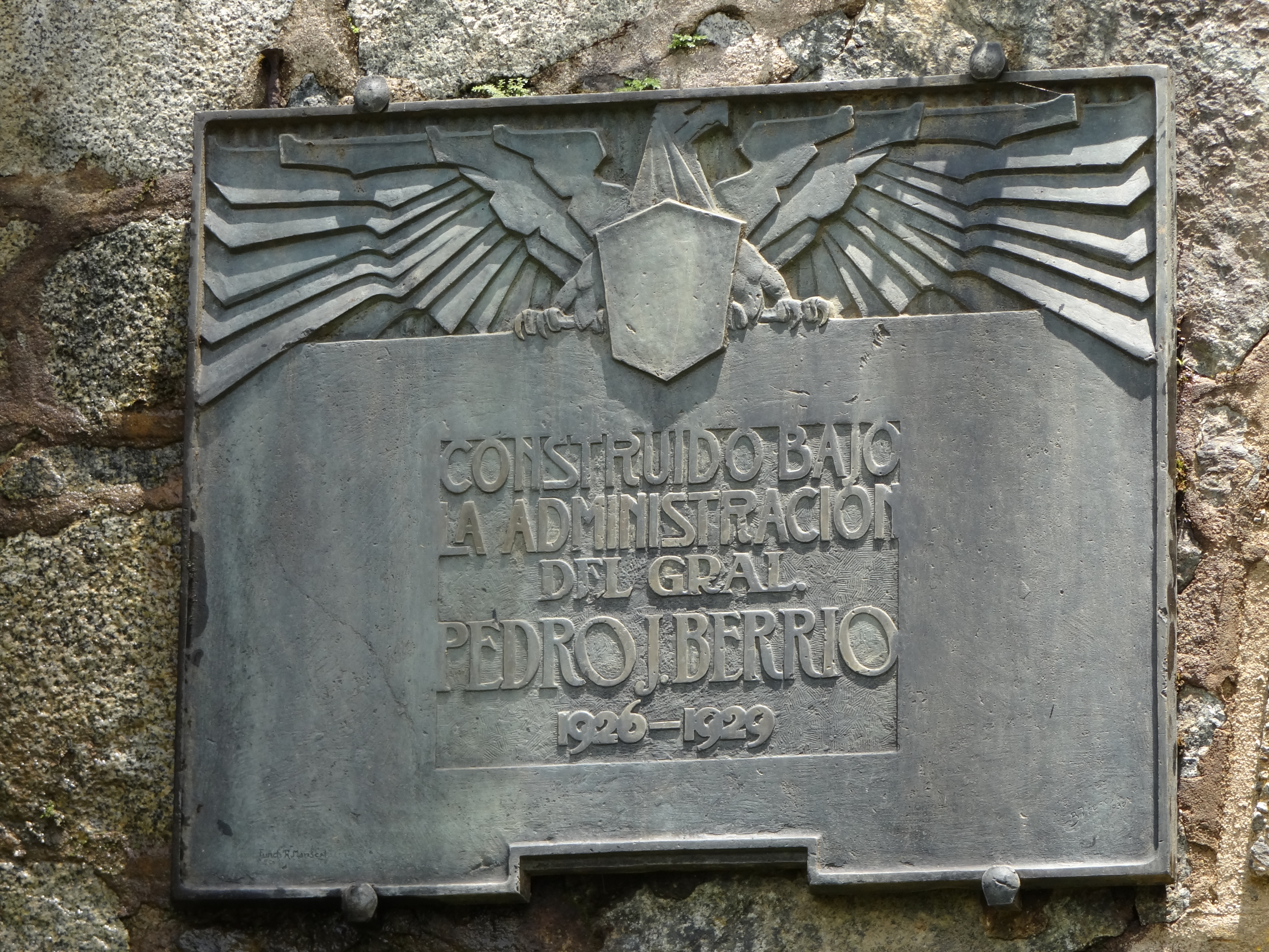 Túnel de La Quiebra